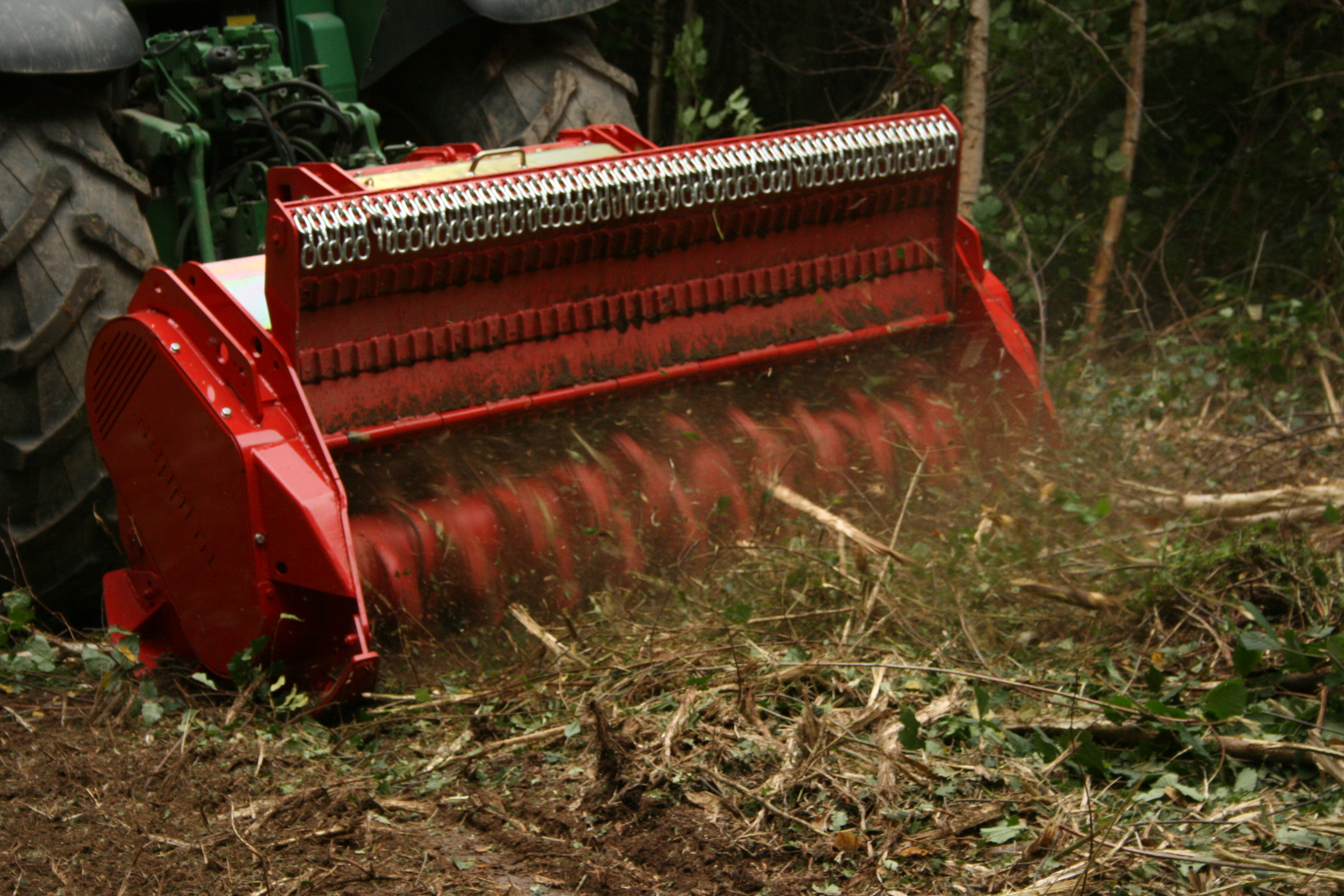 Mulcerul forestier Seppi Midiforst DT in actiune - in cadrul unei demonstratii.